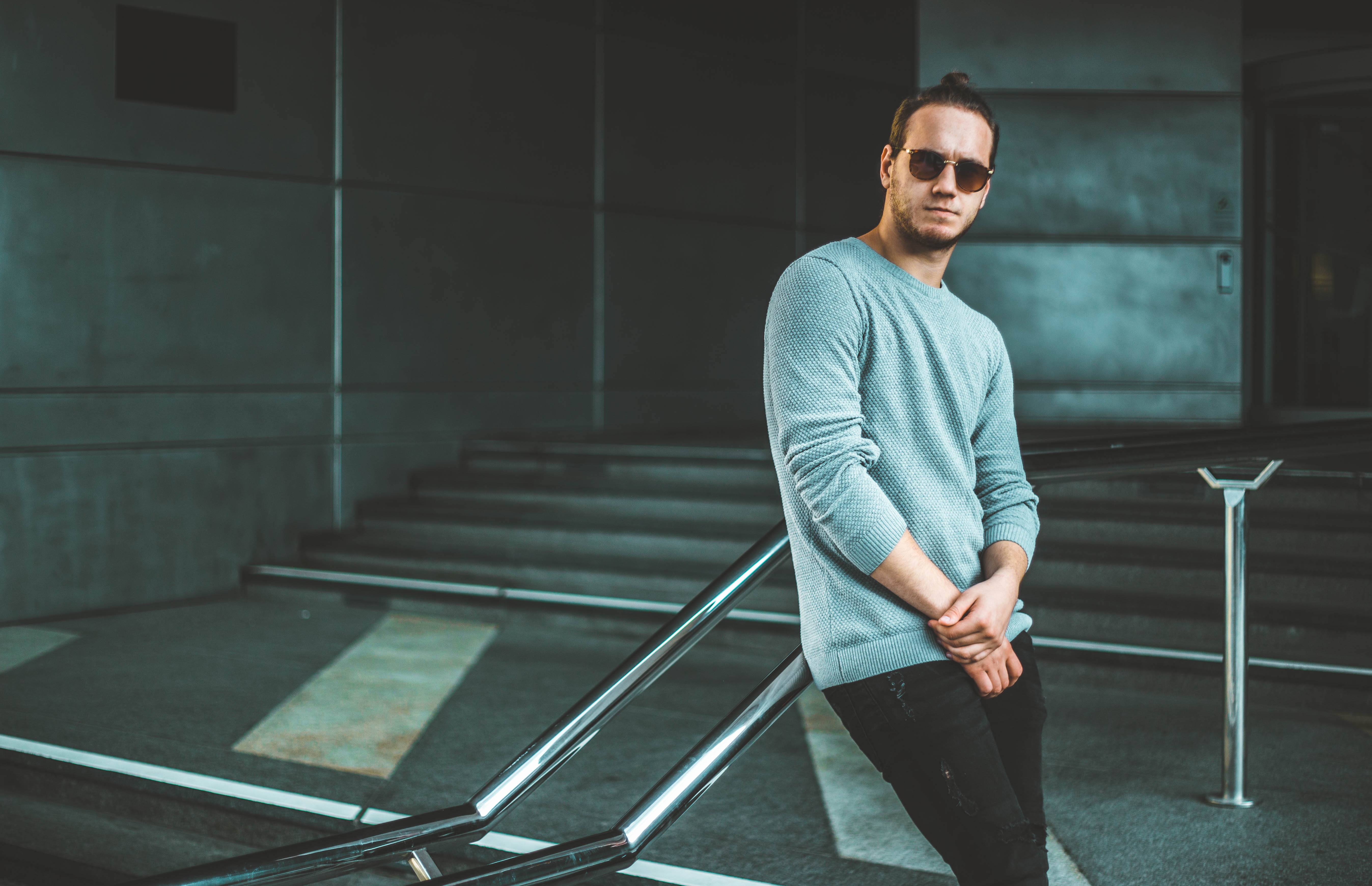 REISS